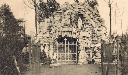 Ginstegrot Oostrozebeke